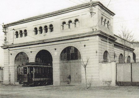 Pavia, rimessa tram Orto Botanico, 1930s